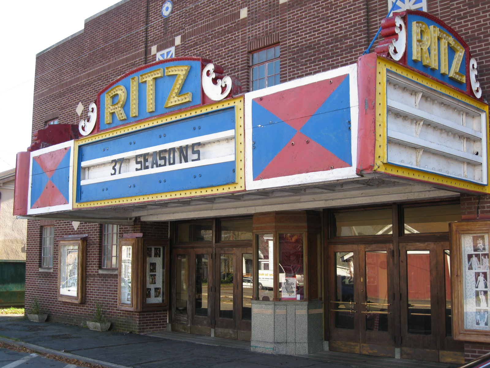 Hawley, Pennsylvania